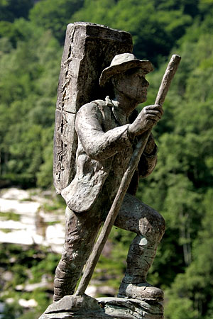 Schmuggler in Gondo